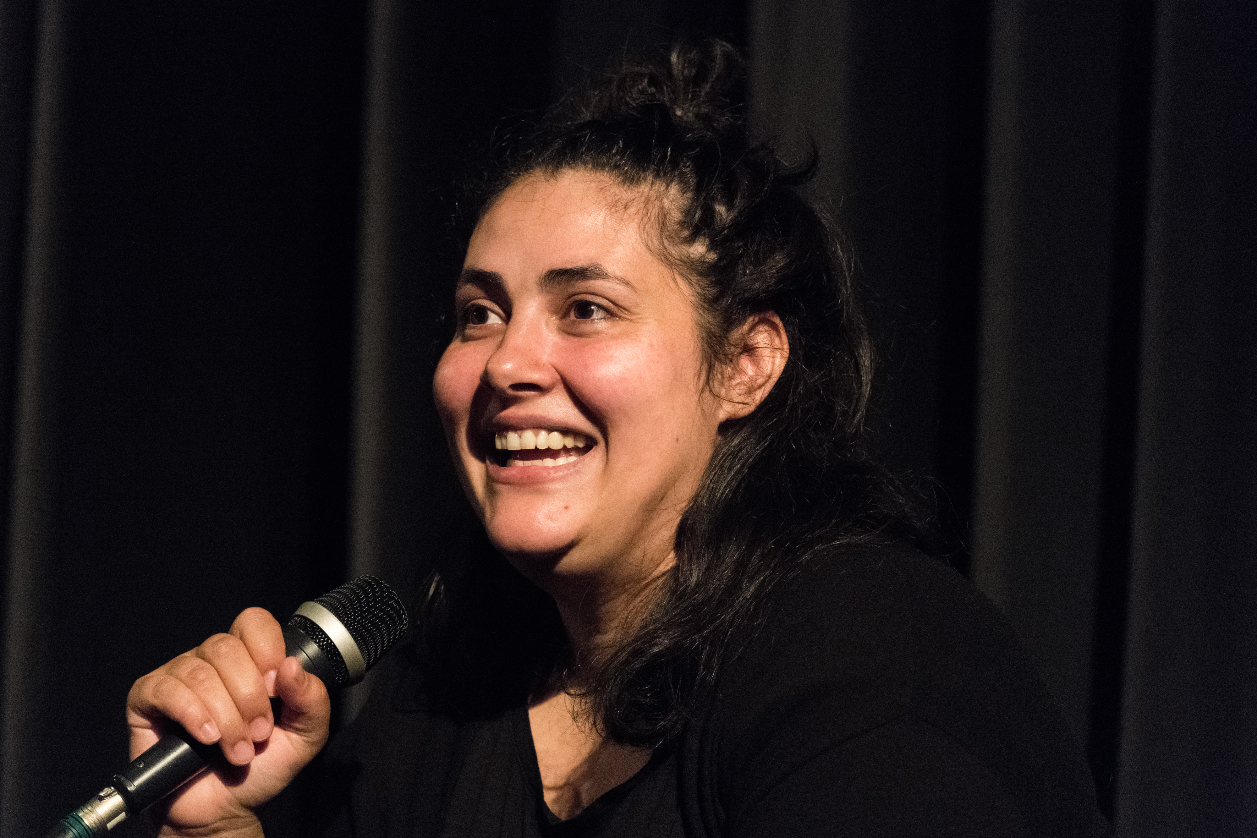 Zorica Nusheva bei Crossing Europe